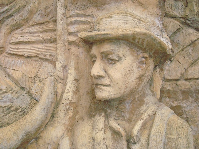 Monumento al boyero (detalle). San Antonio de Escazú, Costa Rica.